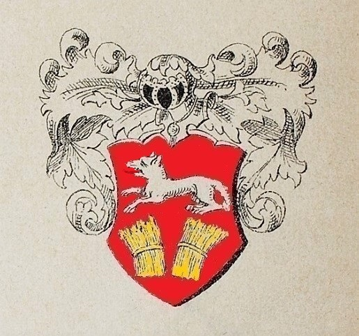 Wappen derer von Berwinkel in Siebmachers Wappenbuch: Der abgestorbene Adel der Provinz und Mark Brandenburg, Band 6, Abt. 5, Tafel 5. Wappendarstellung in Schwarzweiß ohne Helmzier mit Busch aus Federn. Das Wappenbild zeigt: „Ein über zwei nebeneinander gestellten Korngarben ruhender Wolf“. – Wappenschild nachträglich, entsprechend der historischen Überlieferung, farbig gefasst.